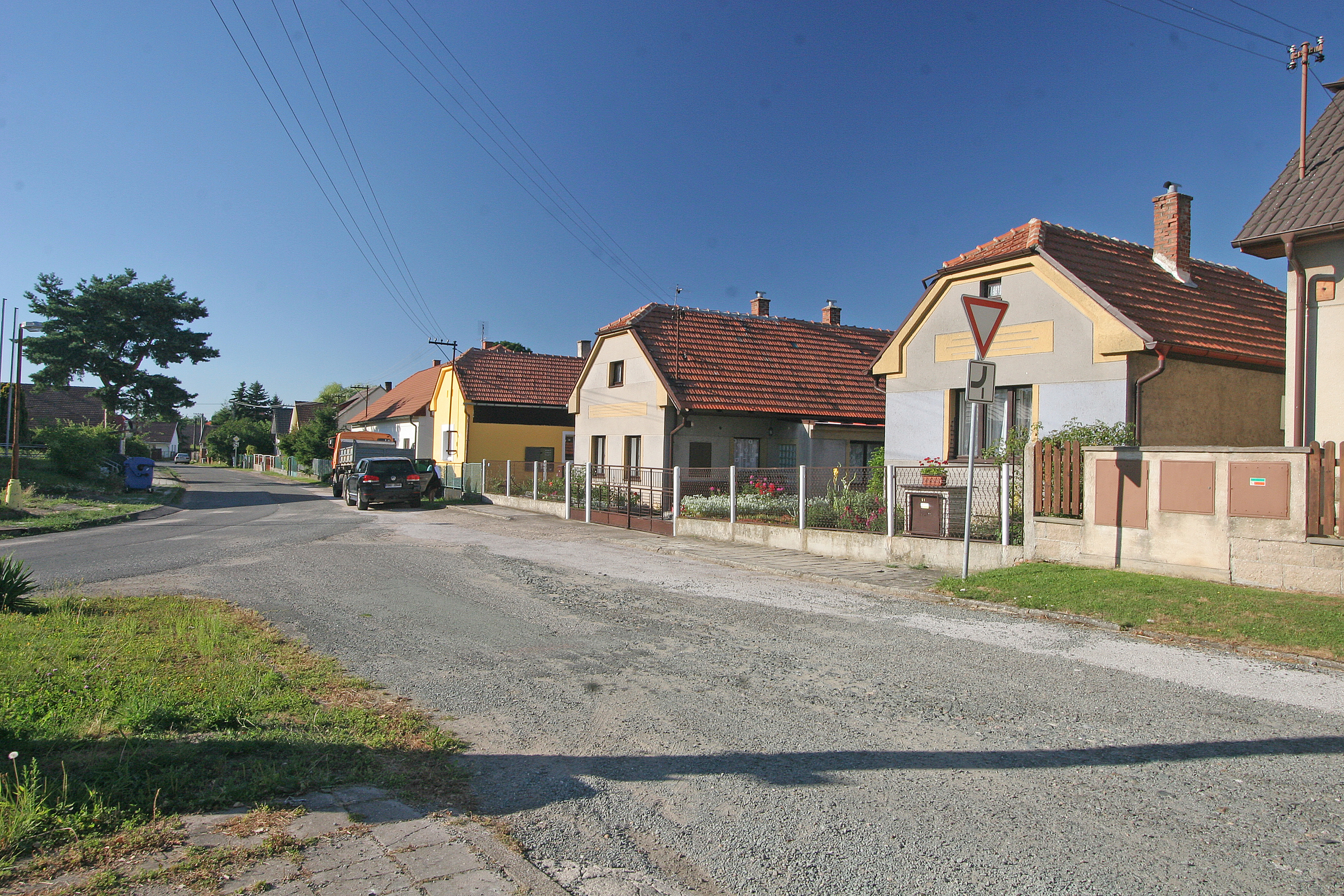 Červeněves čp. 47